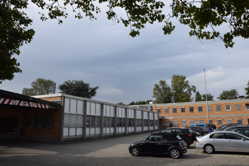 Fahrerlaubnis- und Zulassungsbehörde an der Stielstraße